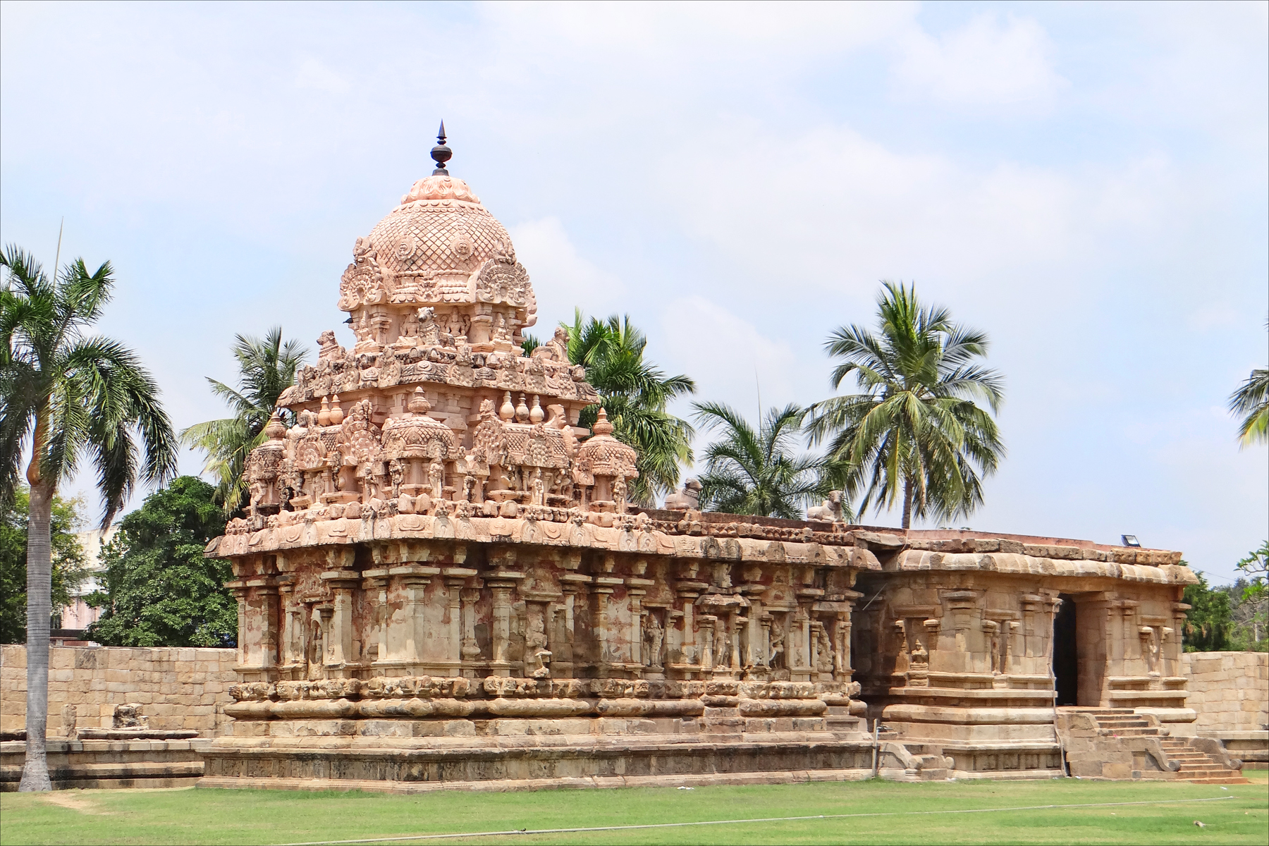 Gangaikonda Cholapuram (Tamil: கங்கைகொண்ட சோழபுரம்) was erected as the capital of the Cholas by Rajendra Chola I, the son and successor of Rajaraja Chola, the great Chola who conquered a large area in South India, Sri Lanka, Bangladesh, Sumatra. Kadaram (Kedah in Malaysia) at the beginning of the 11th century A.D. It occupies an important place in the history of India. As the capital of the Cholas from about 1025 A.D. for about 250 years, the city controlled the affairs of entire southern India, from the Tungabhadra river in the north Karnataka to Ceylon in the south and other south east Asian countries. Dedicated to Shiva, Siva Petit temple annexe construit pour une des épouses du Roi Rajendra dans le temple de Pragatishwara Le temple de Pragatishwara (Sri Pragadheswarar) de Gangaikondacholapuram a été inscrit en 2004 par l'UNESCO sur la liste du patrimoine mondial dans le groupe des « Grands temples vivants Chola » pour son exceptionnelle qualité architecturale et l'abondance de ses sculptures Gangaikondacholapuram est une ancienne capitale de l'empire Chola construite par le roi Rajendra Ier vers 1025 Les grands temples Chola de l'Inde du Sud, dont fait partie le temple de Pragatishwara (appelé parfois Rajendreshvara) constituent des témoignages majeurs de l'évolution de la civilisation tamoule. Leur forme architecturale est caractéristique du style dravidien classique avec une tour pyramidale et un mandapa. Les Chola ont été la deuxième grande dynastie historique du Tamil Nadu, le pays tamoul, dont l'influence fut considérable sur l'ensemble de l'Asie du Sud-Est.